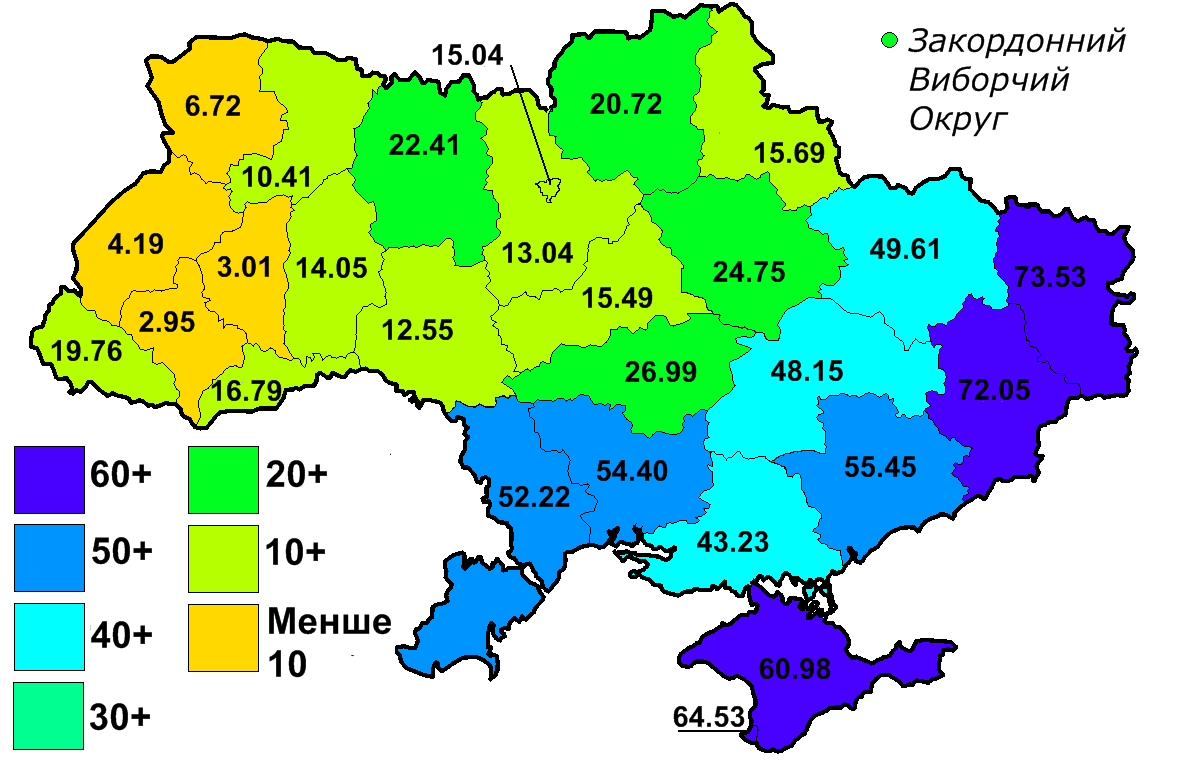 Результат Партії Реґонів за областями